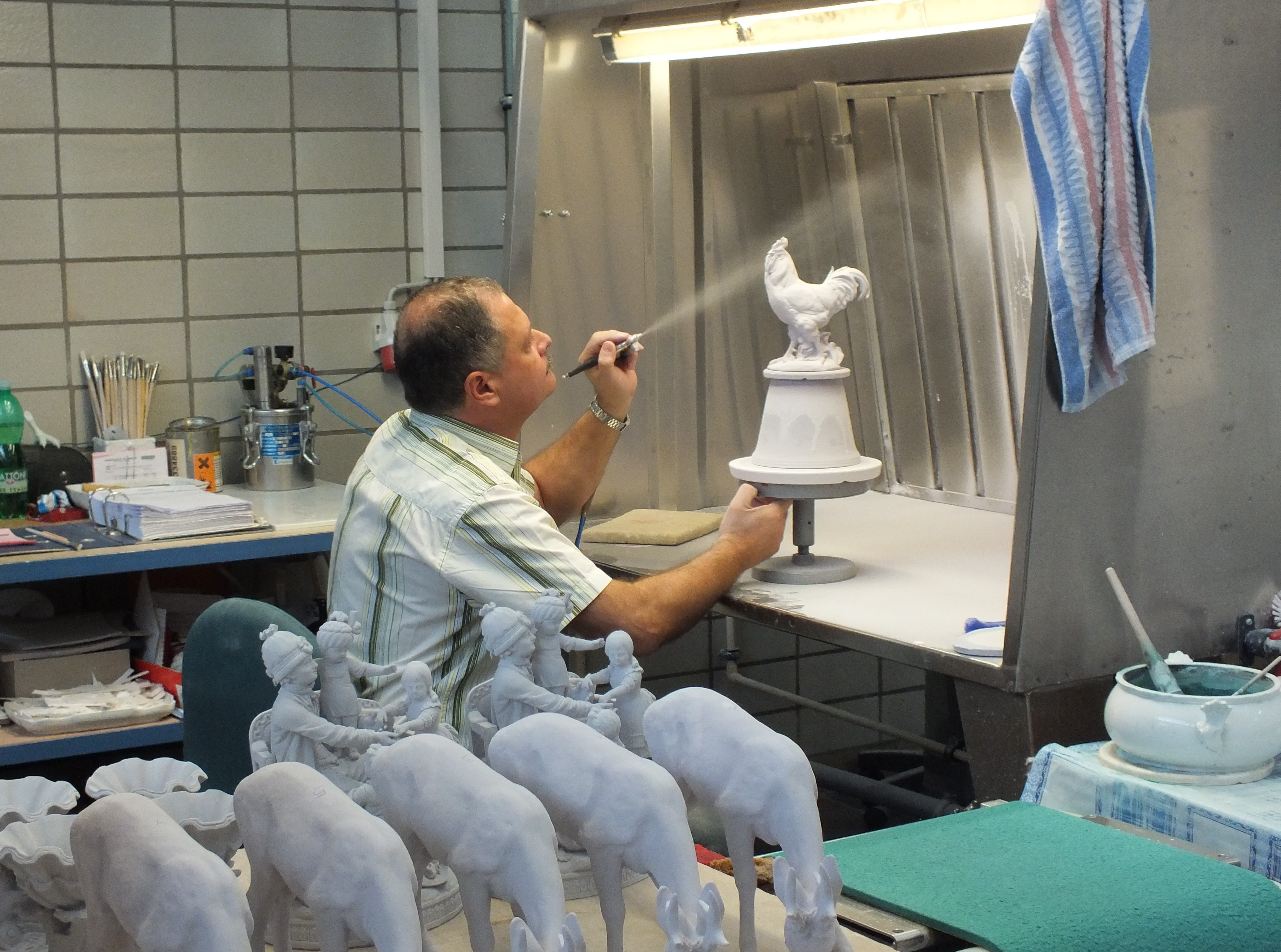 Manufaktur Meißen Tag der offenen Tür 2014 Block in die Werkstätten